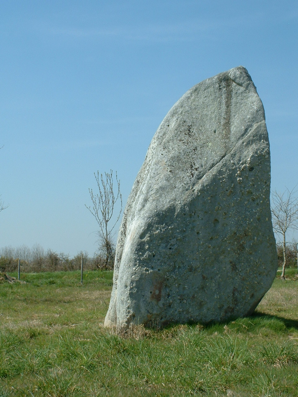 Chauvé (France) - Menhir de la Pierre Lematz